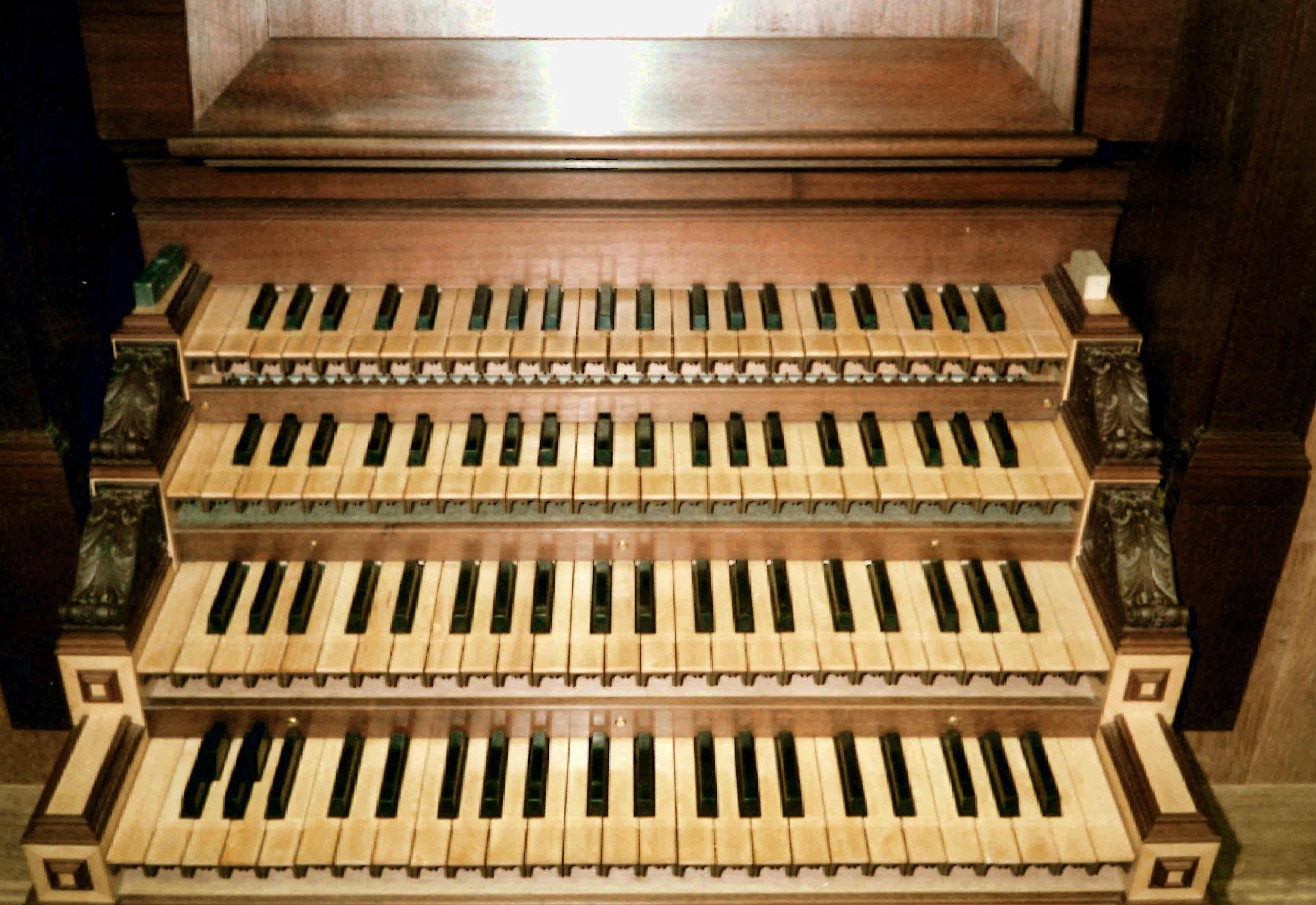 rekonstruierte Manualklaviaturen der Schnitger-Orgel von St. Jacobi in Hamburg